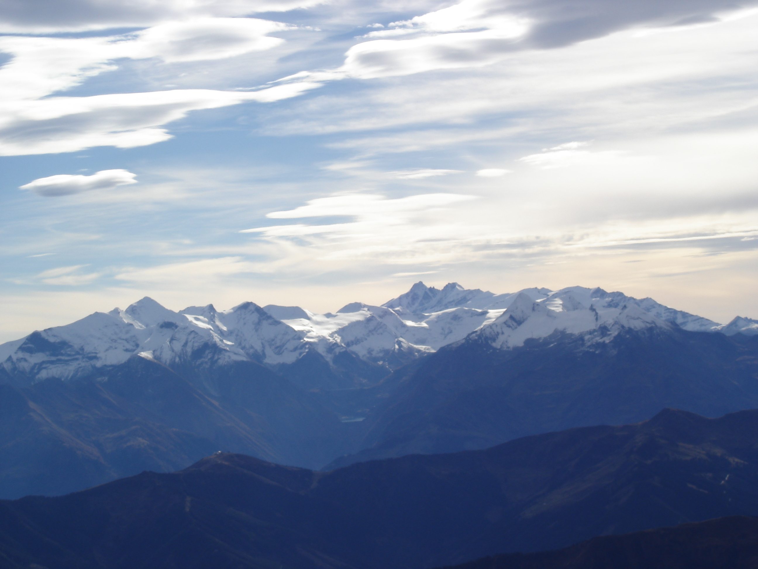 Glocknergruppe von Norden. (Standort des Fotografen vermutlich in den Leoganger Steinbergen in mindestens 2400 m HüA)